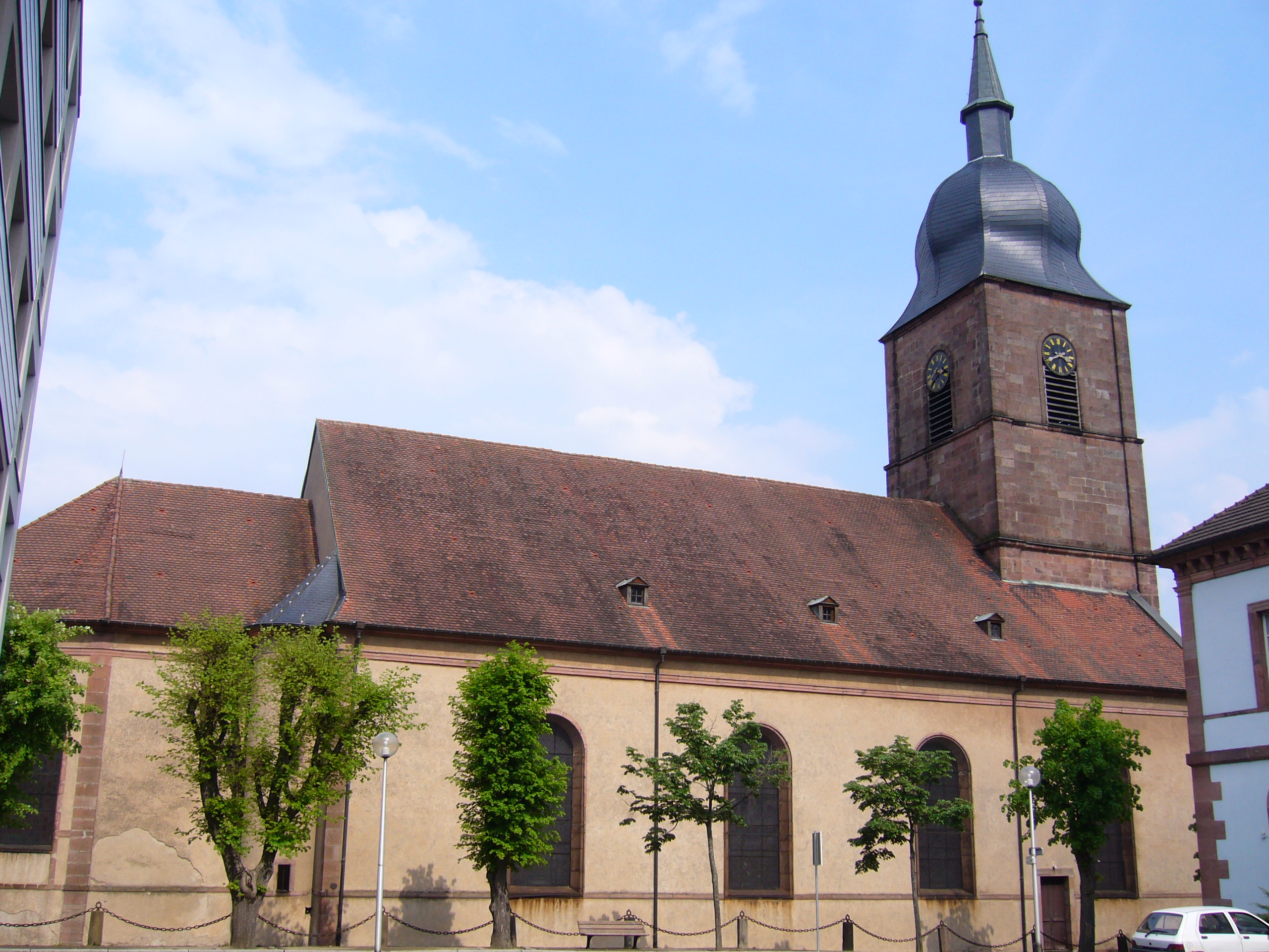 Eglise Sainte Madeleine